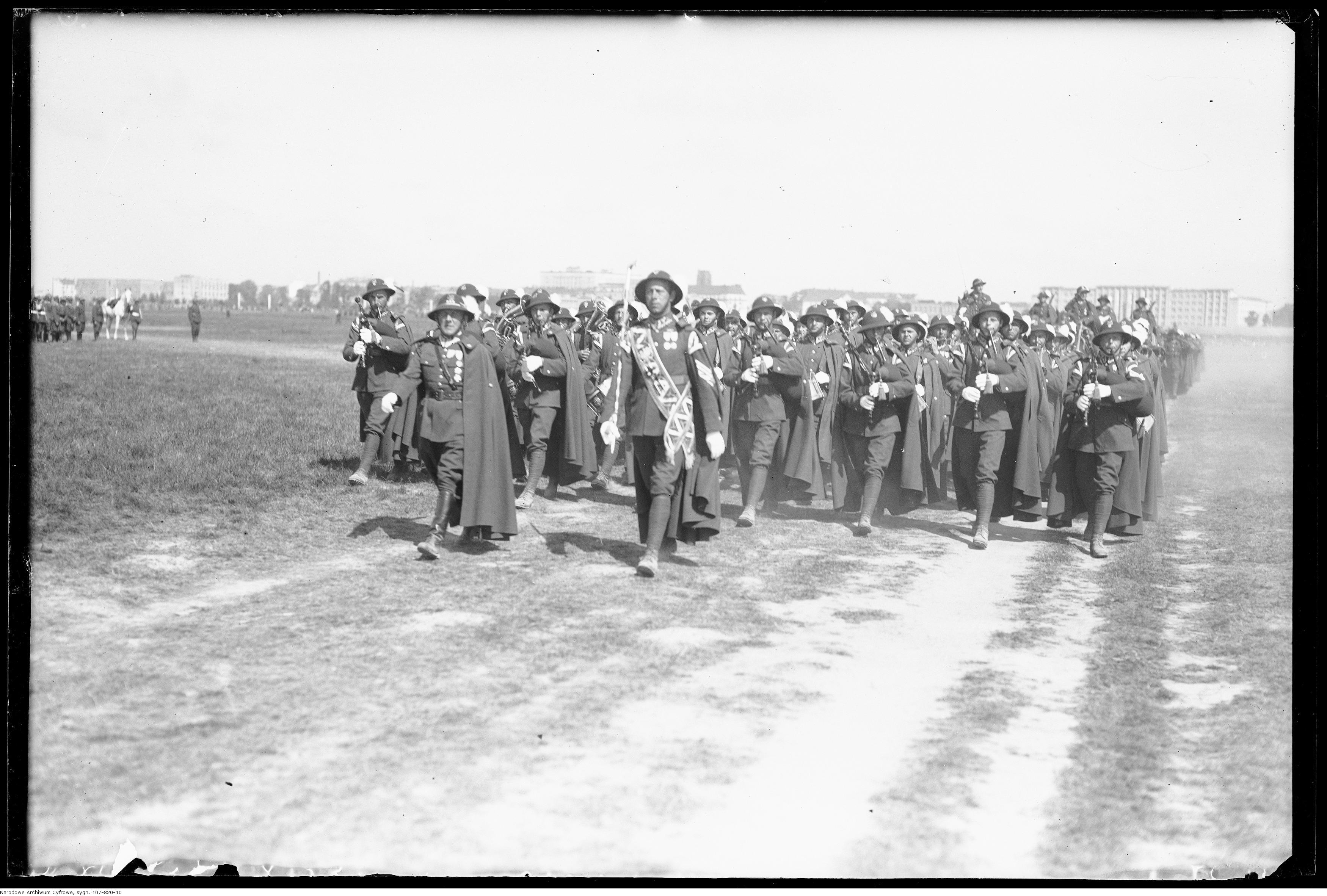 Defilada - strzelcy podhalańscy. Na czele orkiestra.